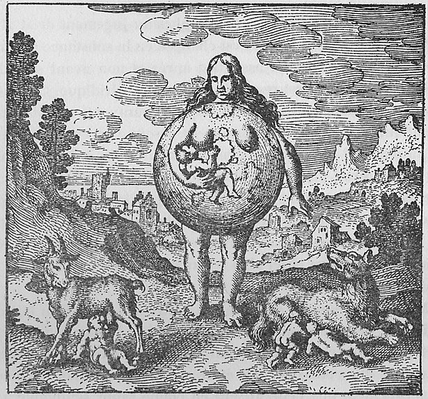 Emblem 02